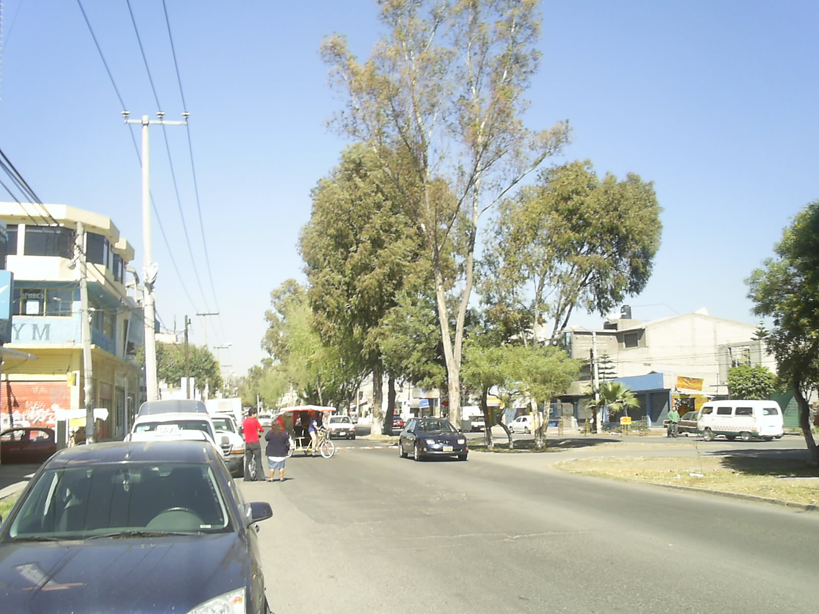 Image:Avenida Jardines de Morelos